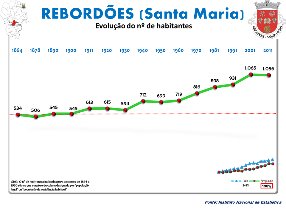 Cenos 1864/2011